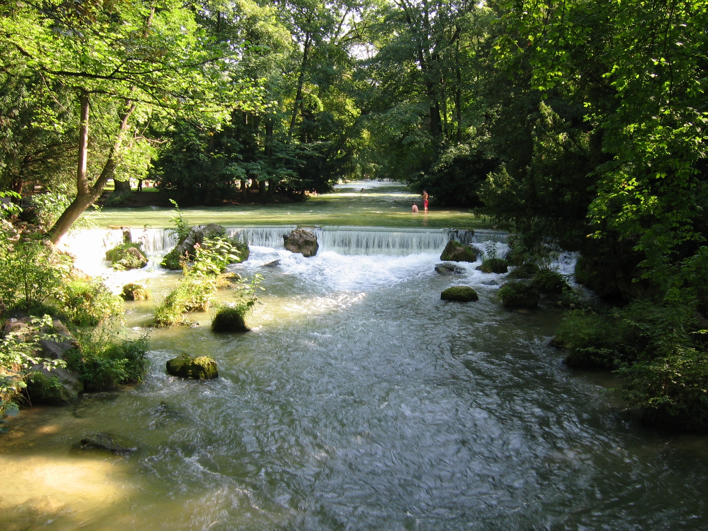 Englischer Garten München. Abzweigung des Schwabinger Bachs vom Eisbach.